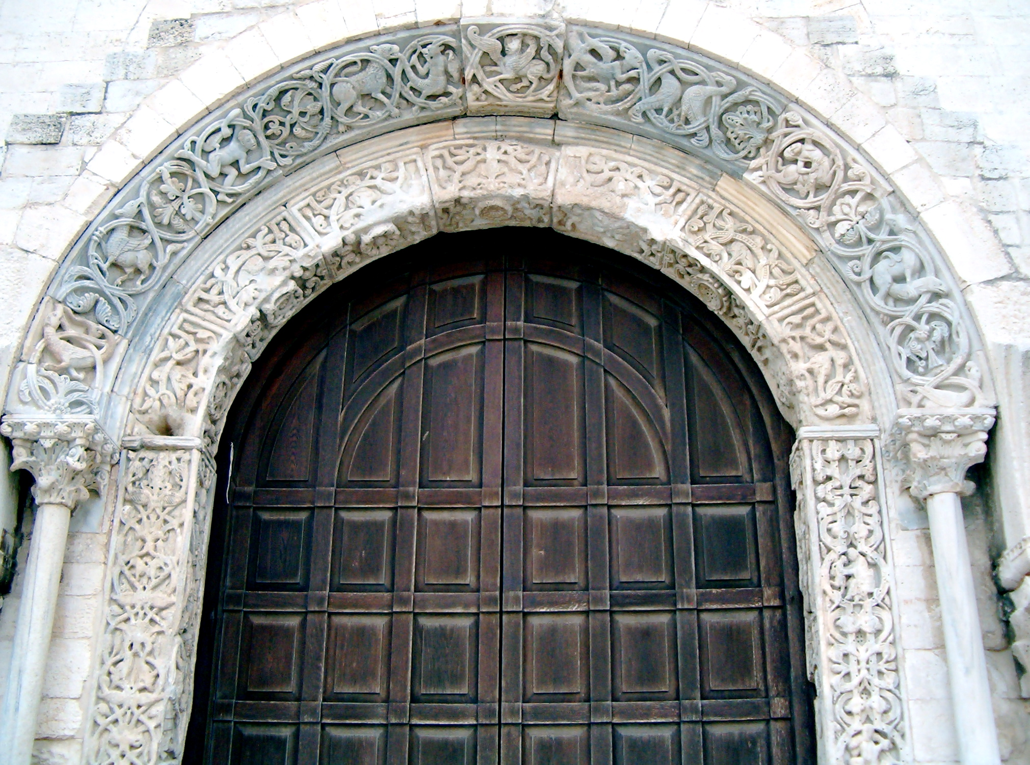 Cattedrale di Trani (Puglia, Italy), 1099 - 1143. Dettaglio del portale.